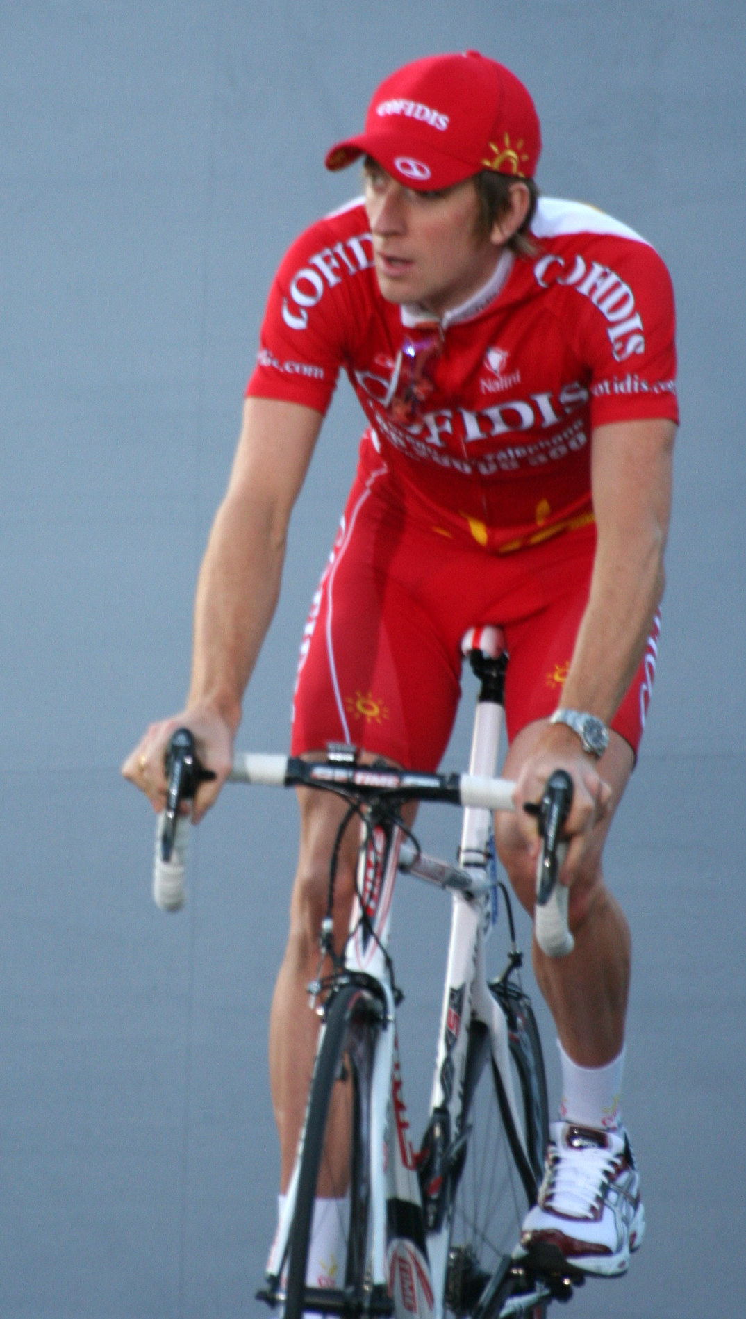 2007 Tour de France intro London